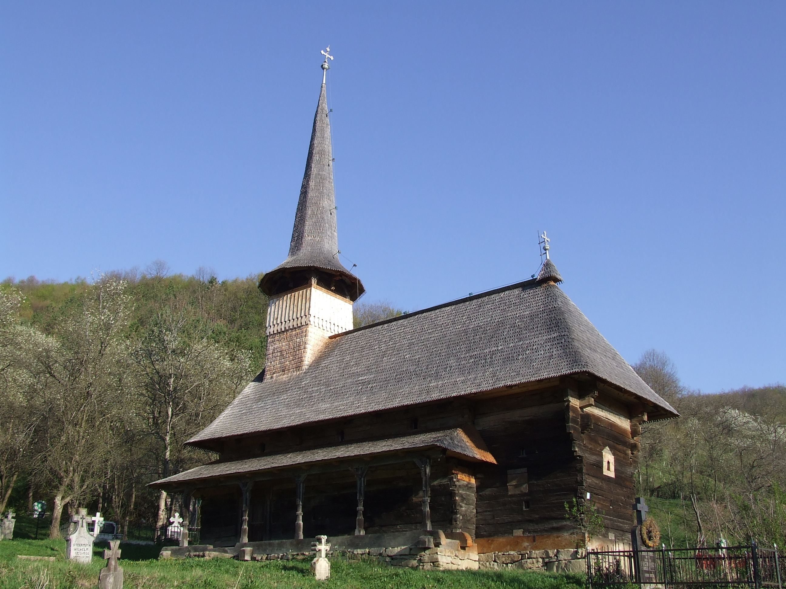 Biserica de lemn din Racâş, judeţul Sălaj. Autor: Bogdan Ilieş Data: aprilie 2007